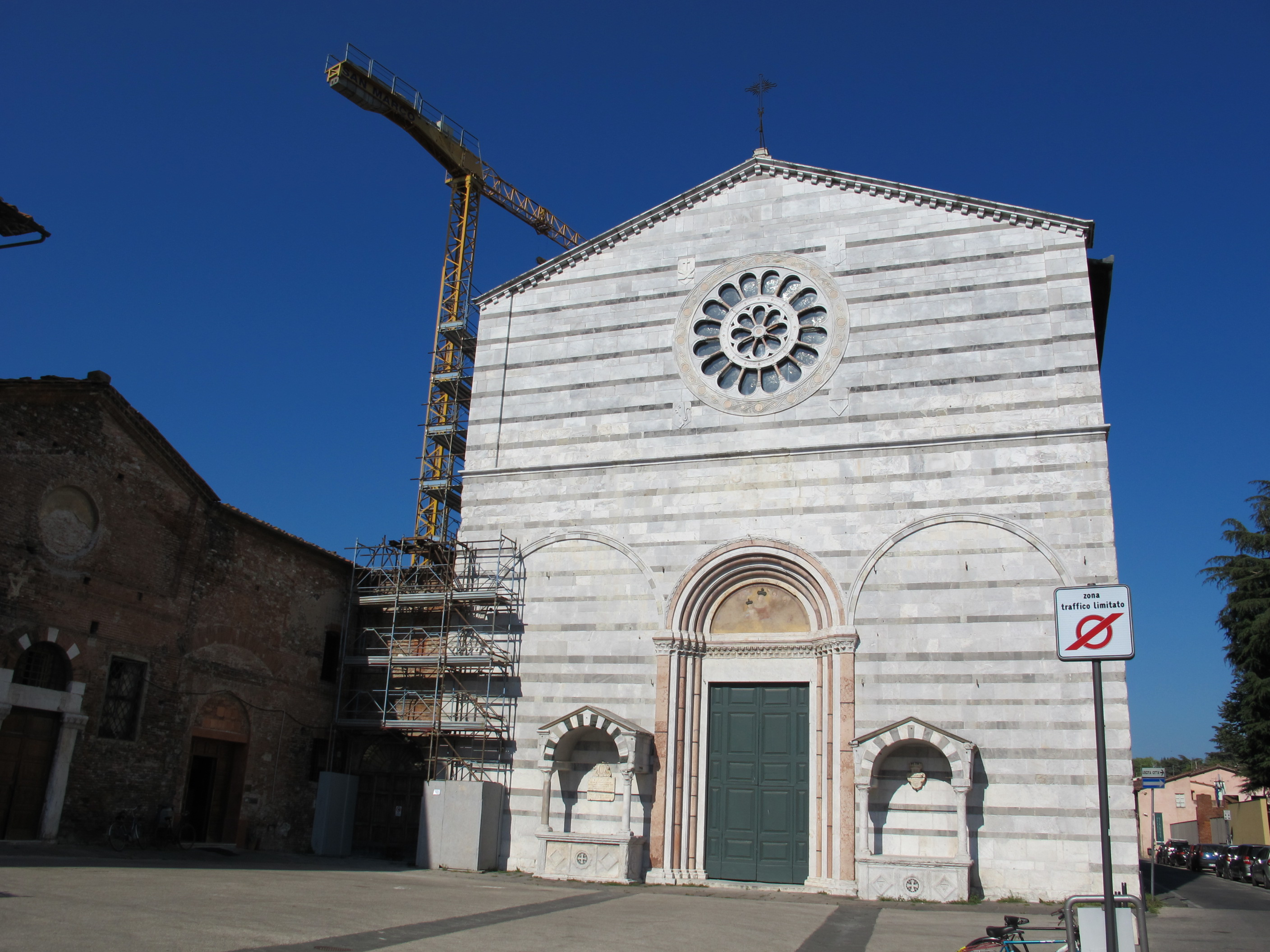 Lucca, san francesco, facciata